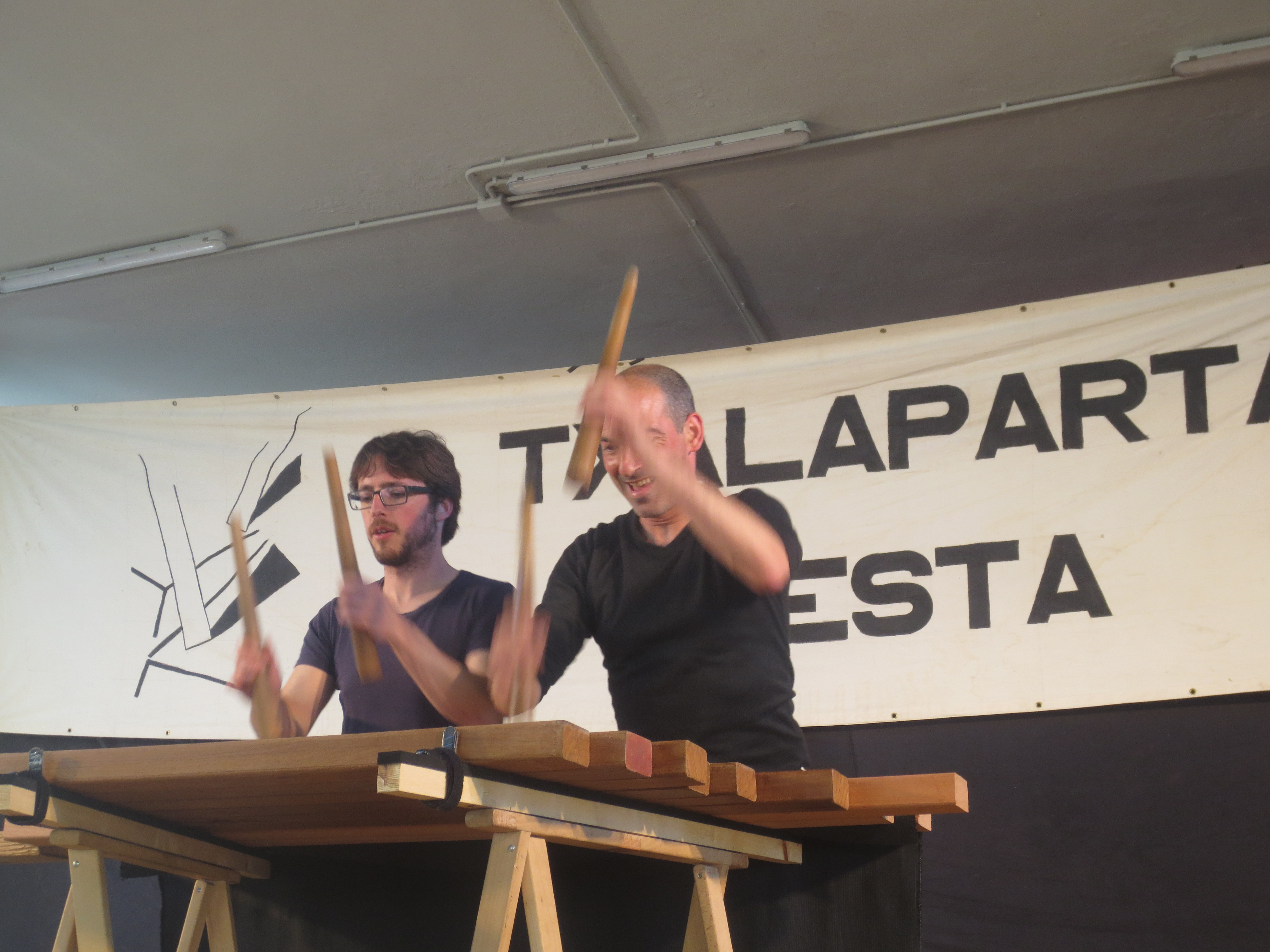 Kimu txalapartari taldea Hernanin, 2017ko maiatzean